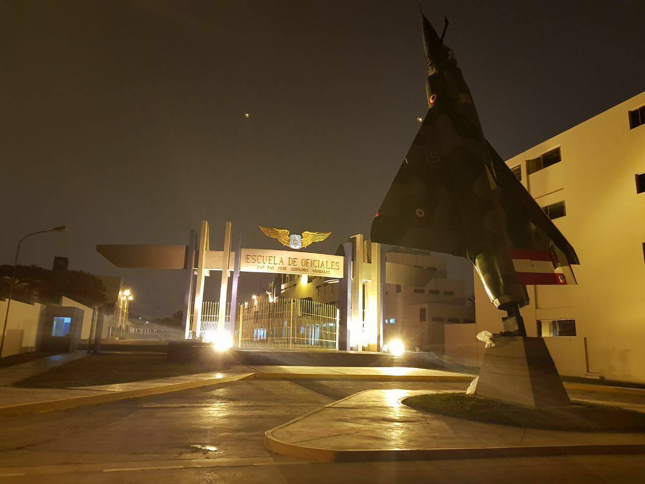 EOFAP